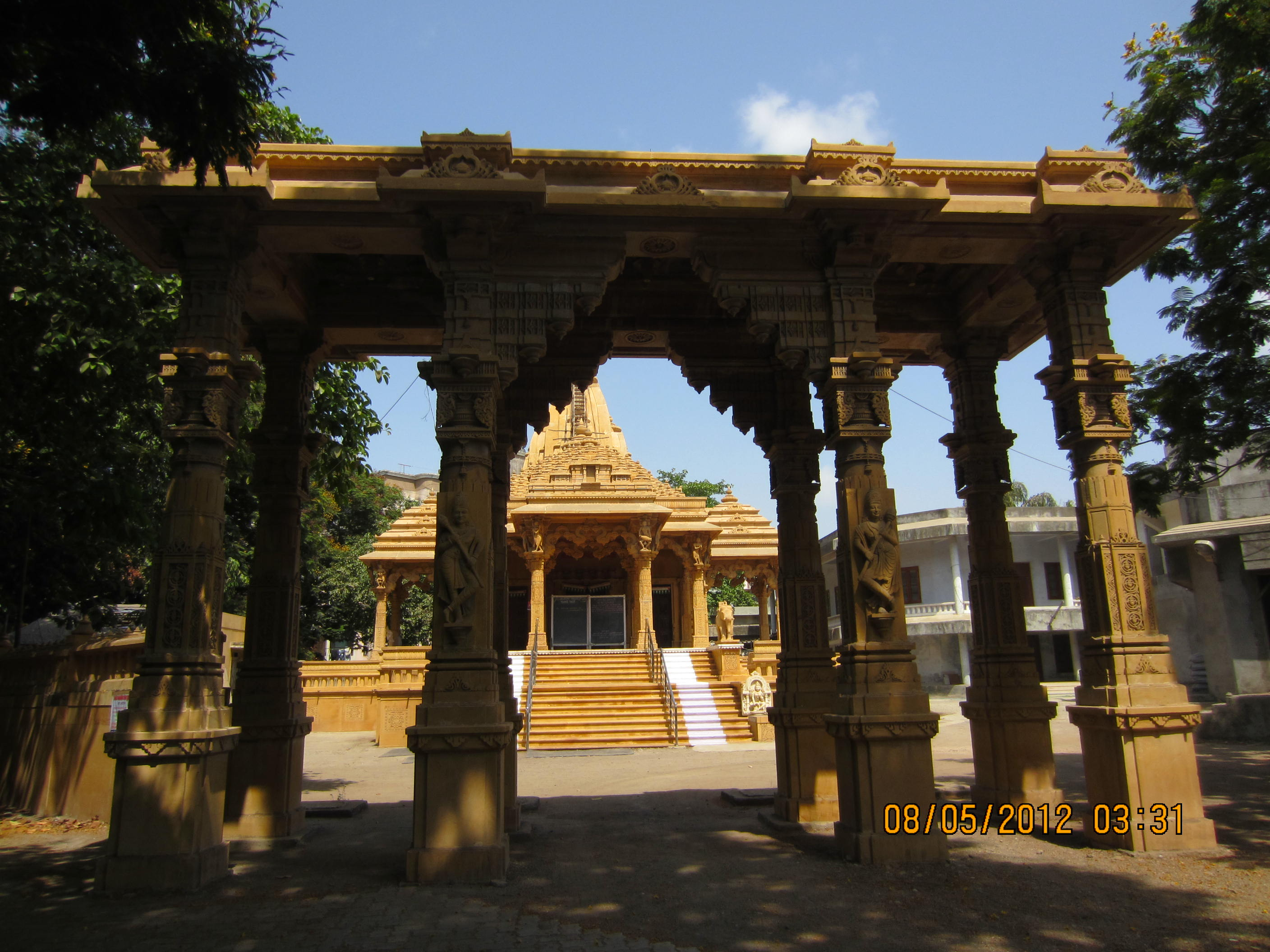 Jain Temple, Vapi GIDC, Vapi